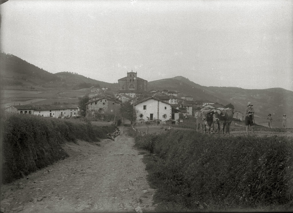 Título original: Vista de la localidad de Elgeta (1/1) Localización: Elgueta (Guipúzcoa)